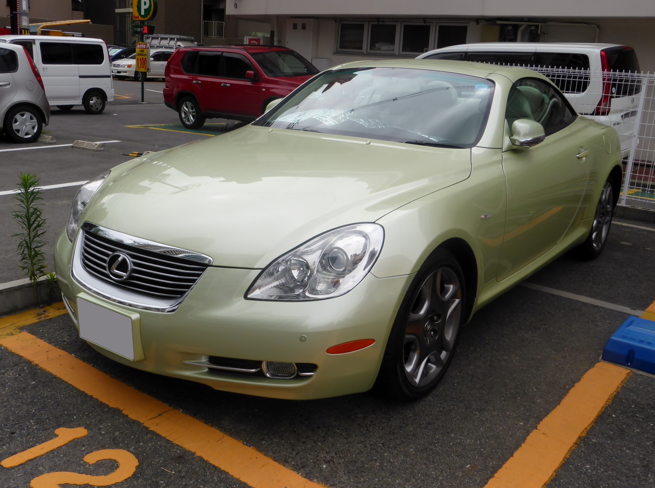 UZZ40型レクサス・SC430をフロントから撮影。